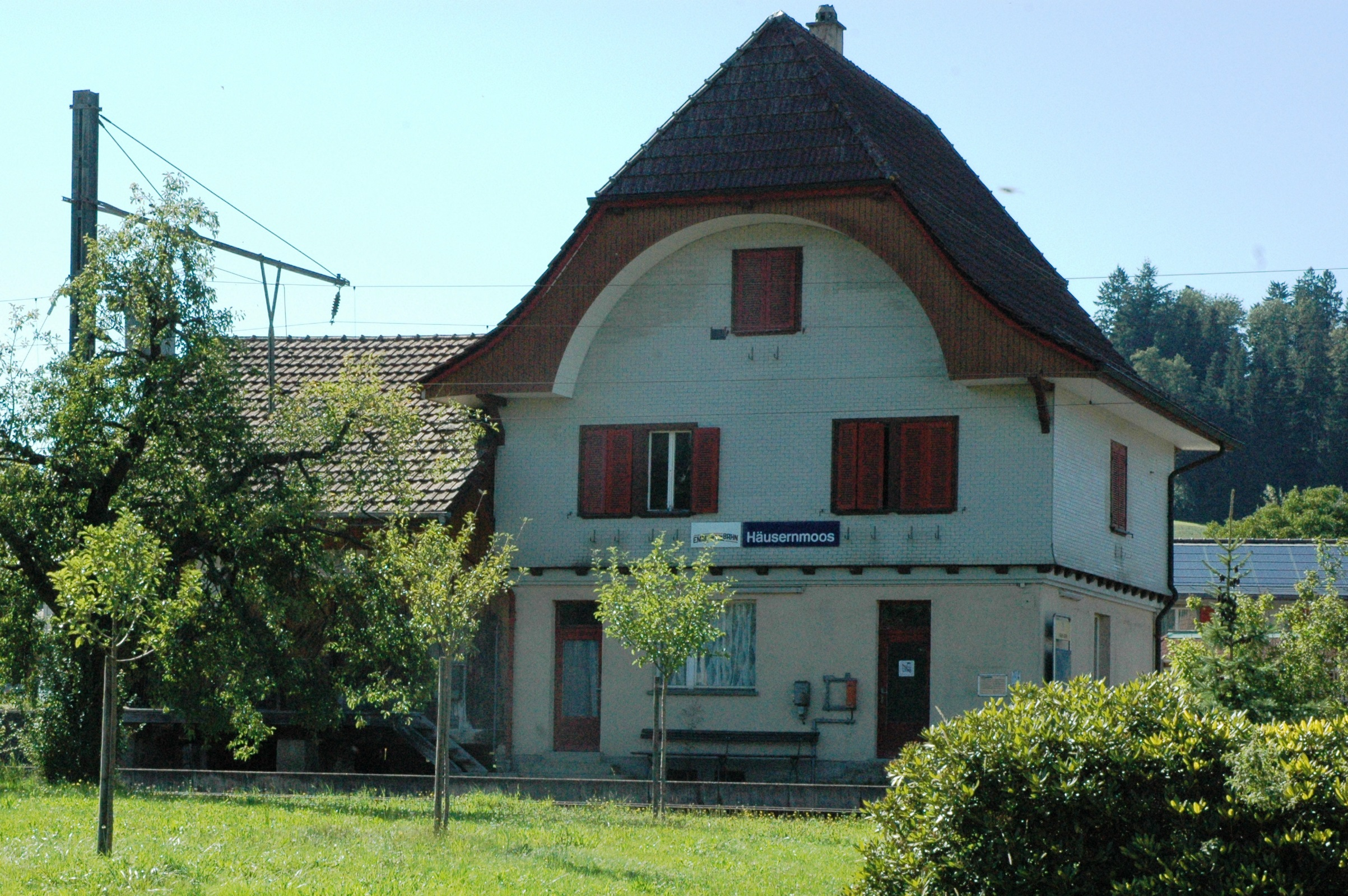 Bahnhofgebäude von Häusernmoos nach Übernahme durch die Emmentalbahn GmbH